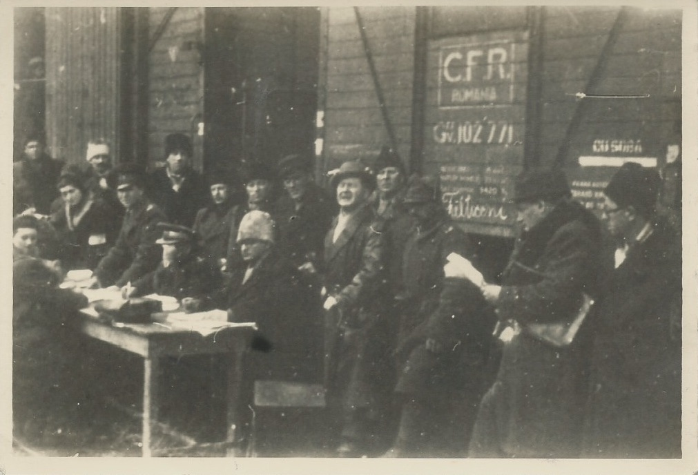 מיון ילדים יתומים לקראת שחרורם מטרנסניסטריה